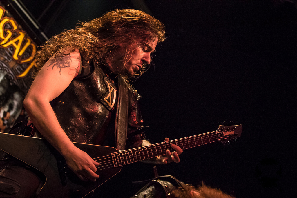 Ex Deo - Paganfest 2013 Wuerzburg - 01-03-2013